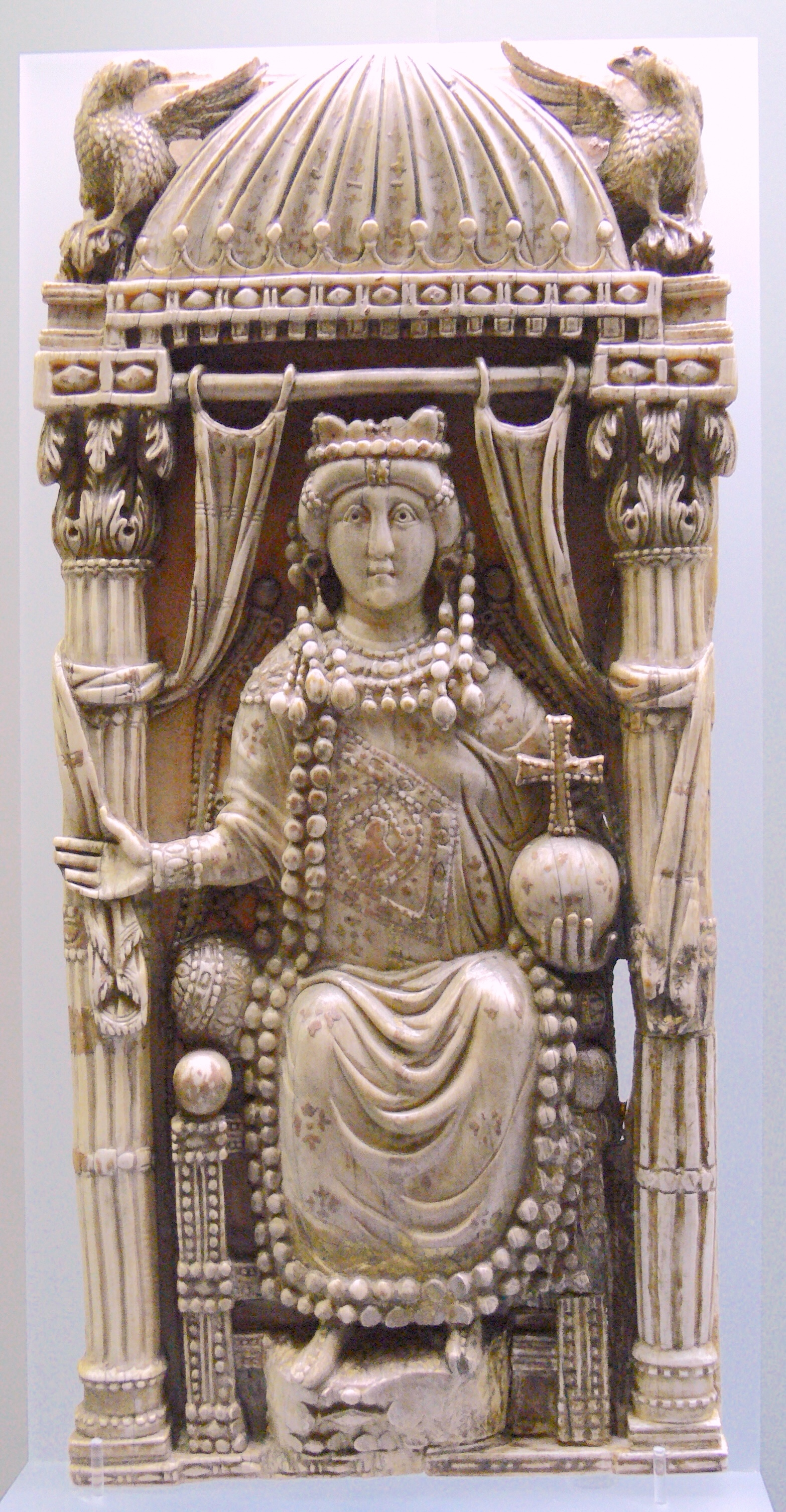 Wien, Kunsthistorisches Museum, Antikensammlung, Relief "Kaiserin Ariadne", oströmisch, um 500 n. Chr., Inv. Nr. X 39